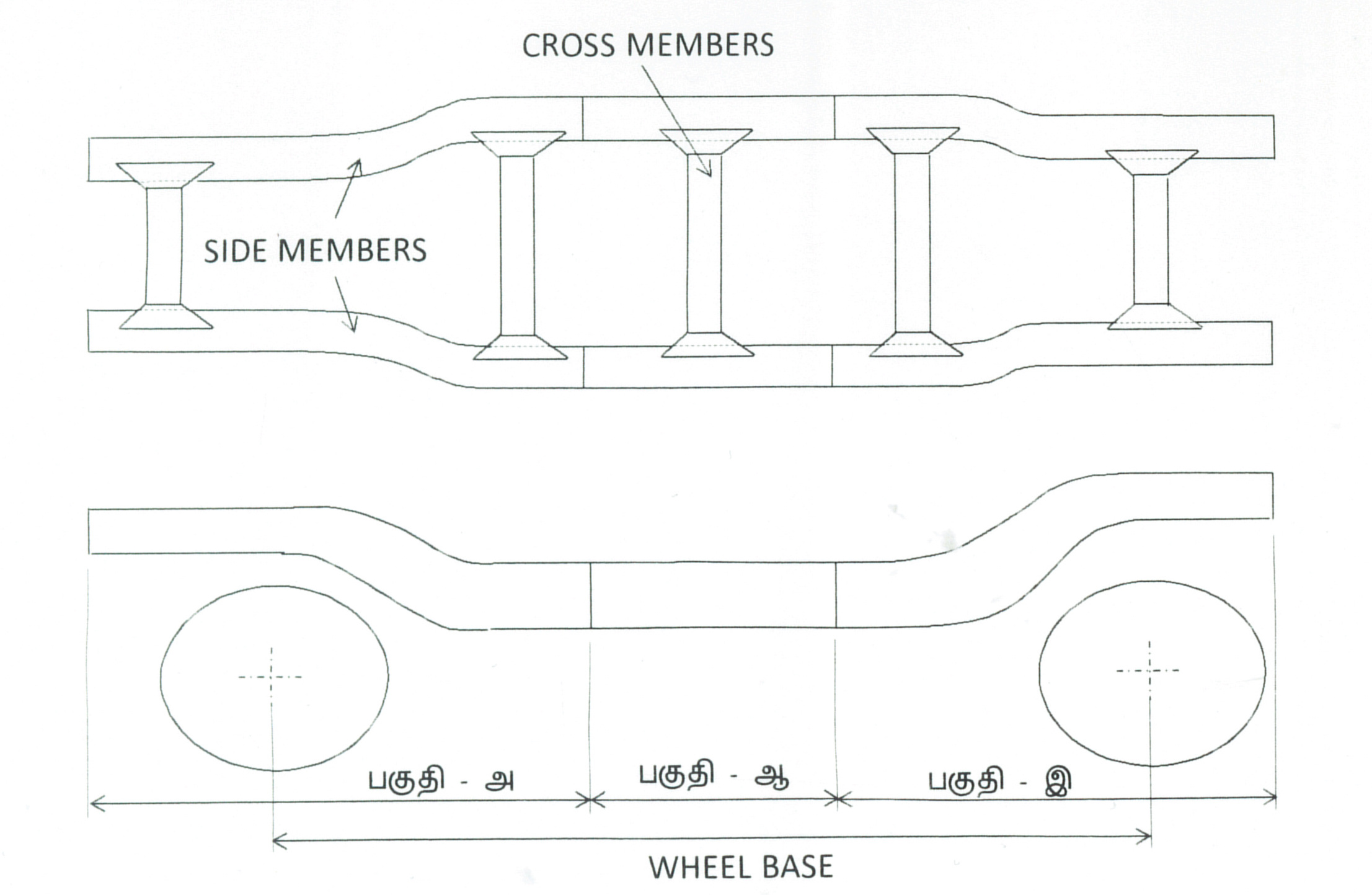 அடிச்சட்டம் (FRAME)